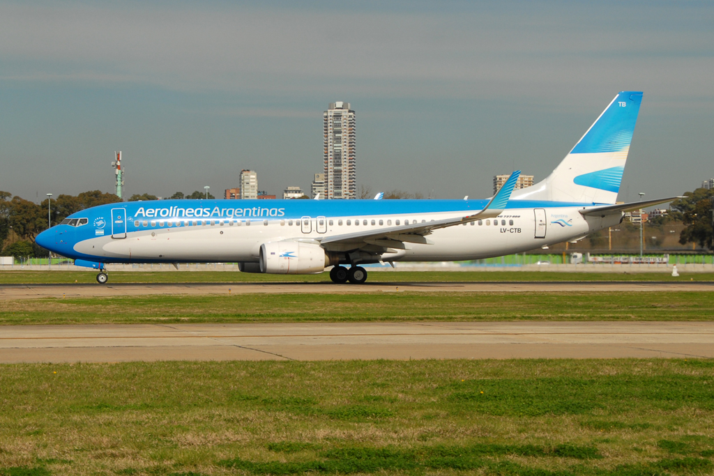 LV-CTB@AEP 11AUG14